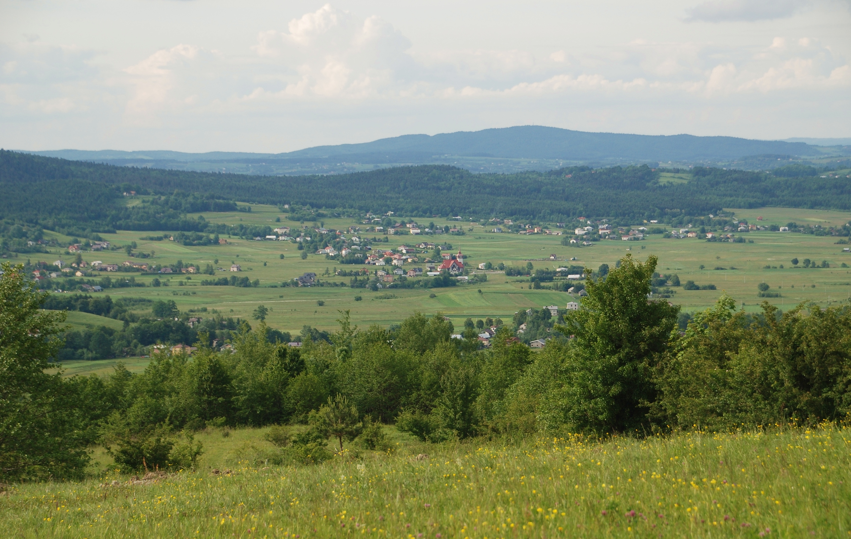 wieś Pagorzyna